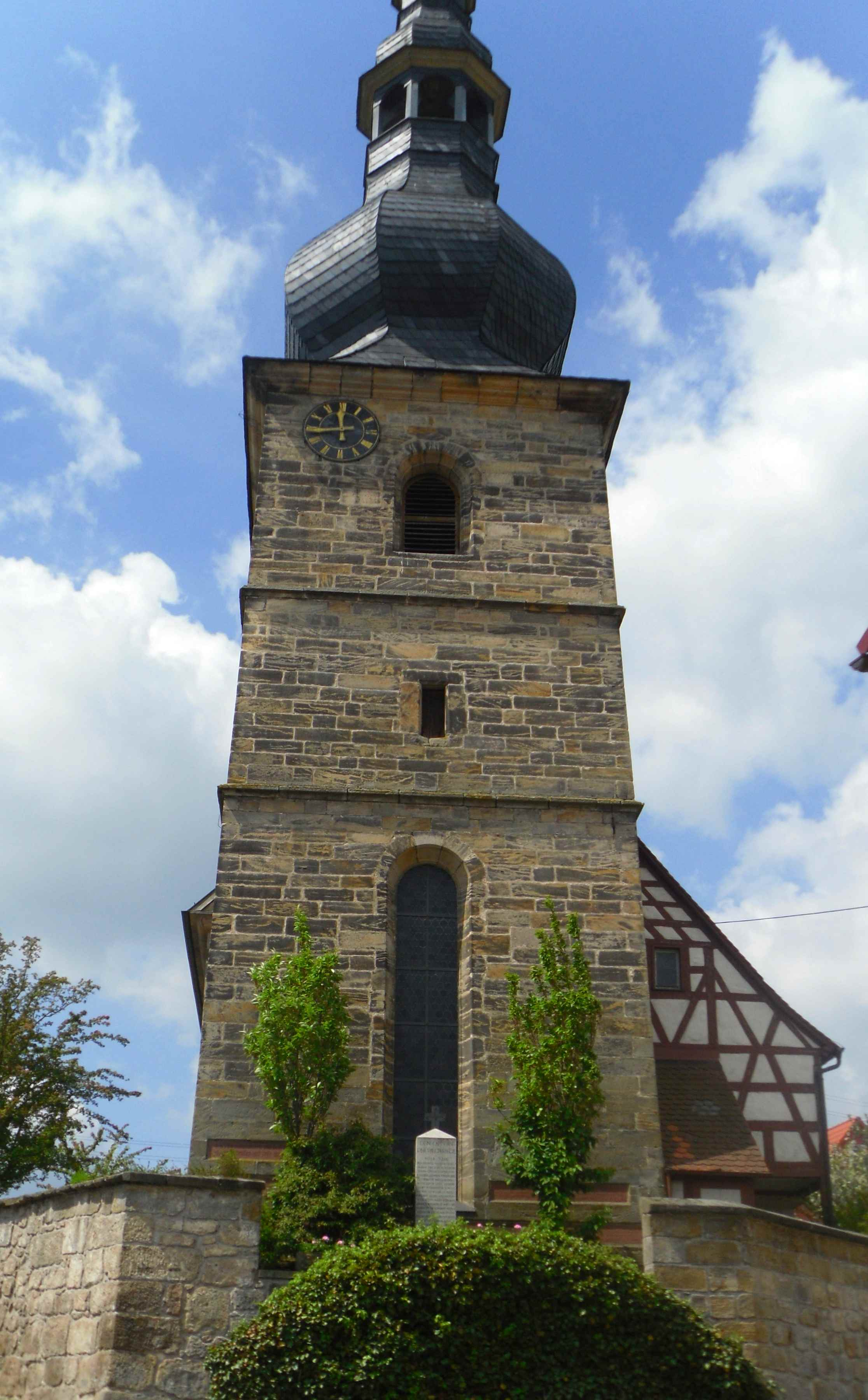 Die Kirche im Thurnauer Ortsteil Hutschdorf